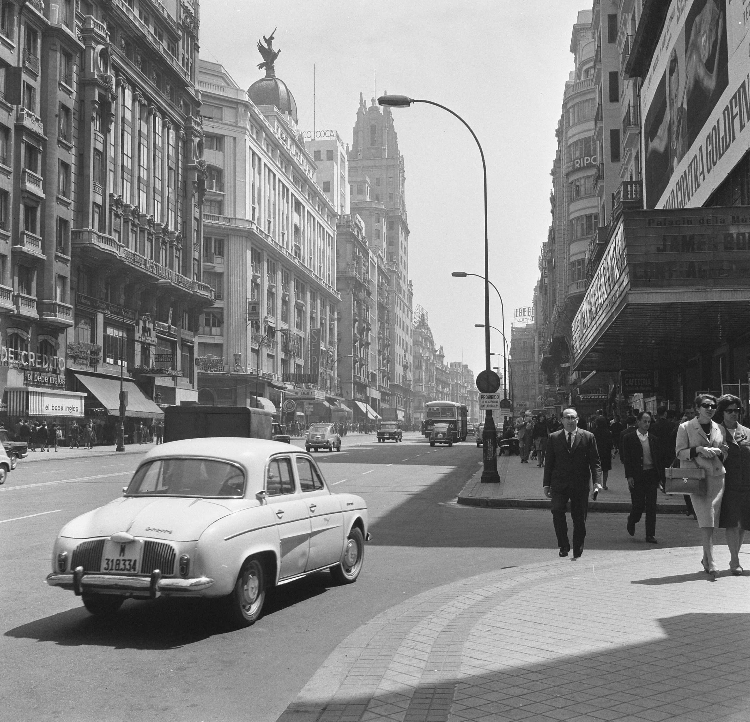 Collectie / Archief : Fotocollectie Anefo Reportage / Serie : [ onbekend ] Beschrijving : Spanje, Madrid, Avenue Jose Antonio Datum : 27 juli 1965 Locatie : Madrid Trefwoorden : steden Persoonsnaam : avenue jose antonio Fotograaf : Evers, Joost / Anefo Auteursrechthebbende : Nationaal Archief Materiaalsoort : Negatief (zwart/wit) Nummer archiefinventaris : bekijk toegang 2.24.01.03 Bestanddeelnummer : 918-0106